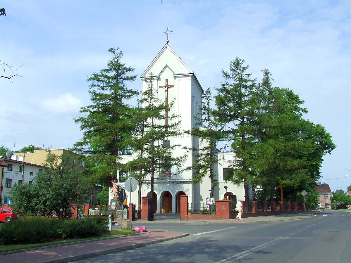 Kościół na rynku w Brwinowie, wylot na Błonie